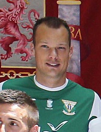 Felicidades pepineros!! Vuestro ascenso a Primera es la historia de un sueño, el resultado de vuestro trabajo y esfuerzo. Sois un orgullo para todo Madrid! Enhorabuena CD Leganés. #LeganésEsDePrimera